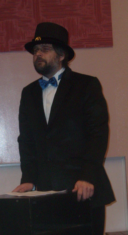 arheoloog Aivar Kriiska 24.02.2008 Narva kolledzis aastapäevakõnet pidamas